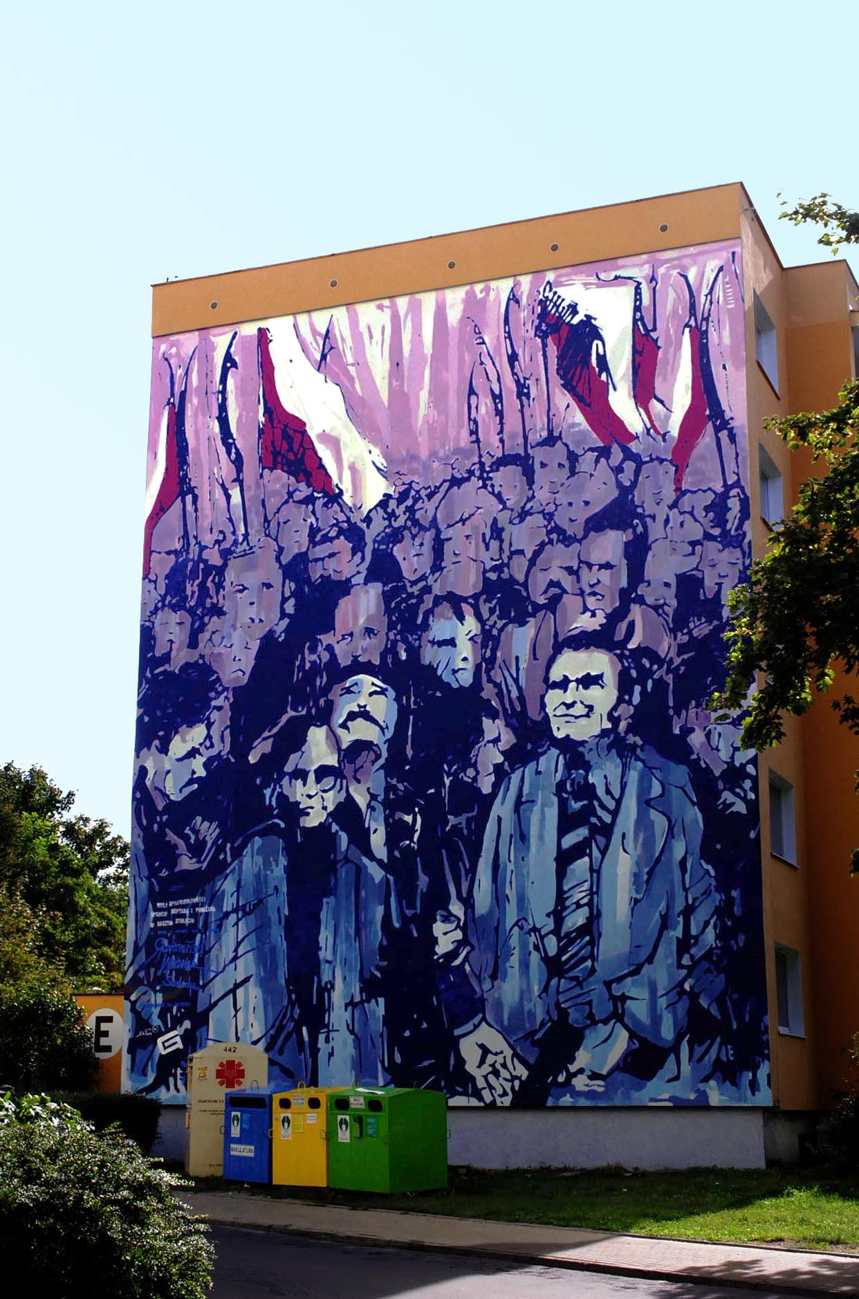 Rafał Roskowiński - materiały ze zbiorów autora.